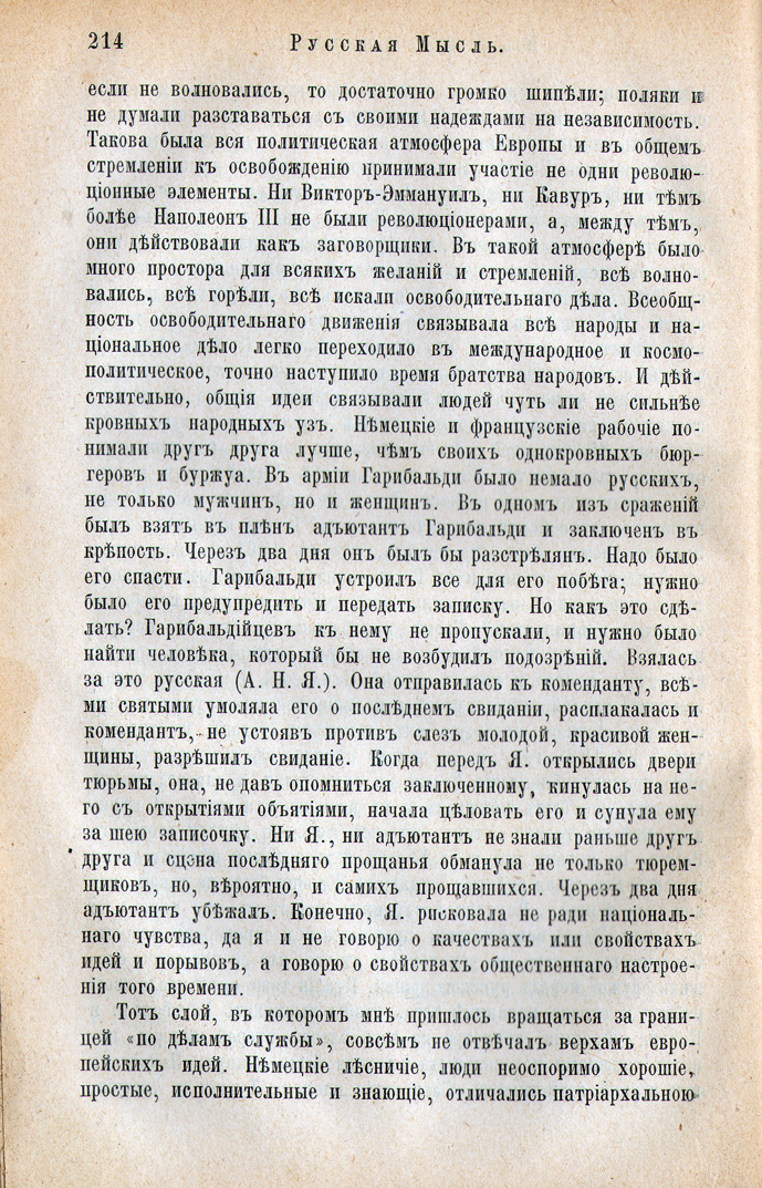 Воспоминания Н. В. Шелгунова "Прошлое и настоящее" в журнале "Русская мысль", 1886, январь. Фрагмент воспоминаний об Александре Якоби и Джузеппе Гарибальди